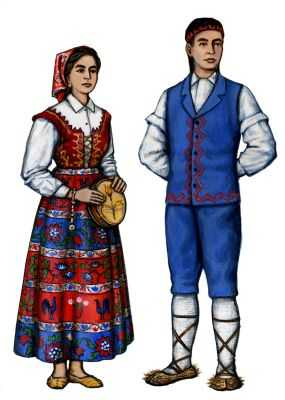 Сицилийский национальный костюм